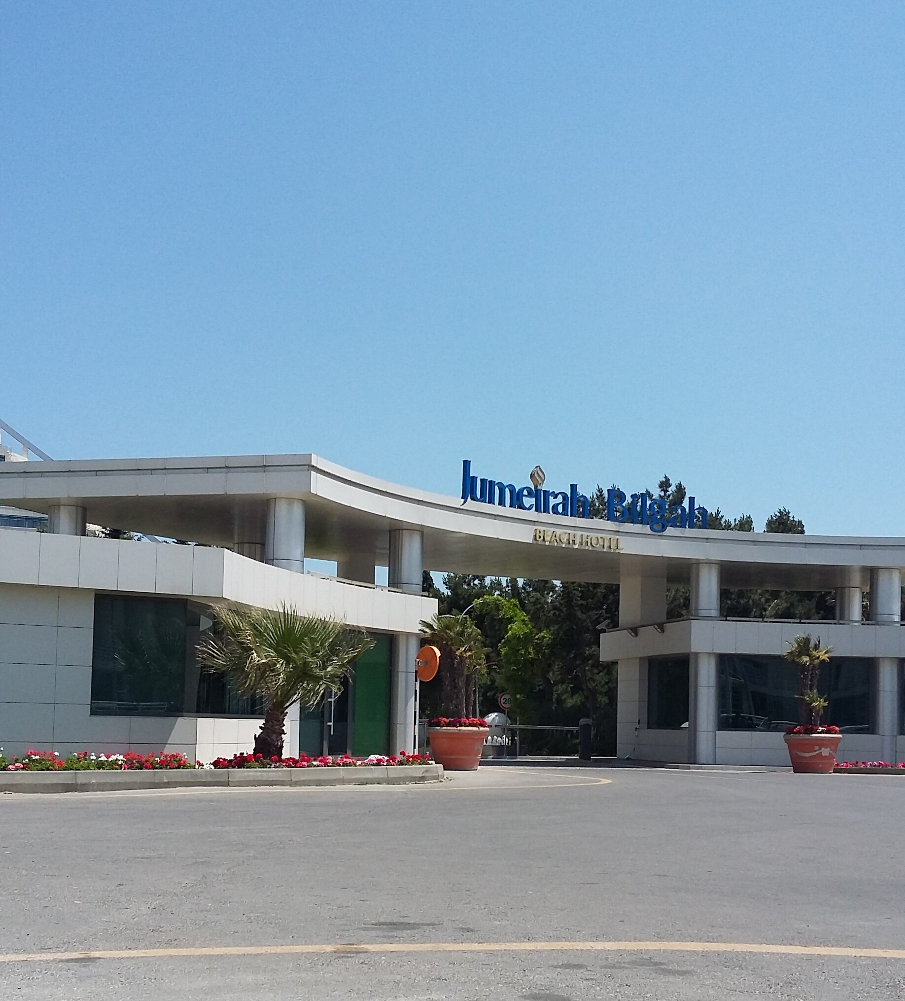 Jumeirah Bilgah Beach Hotel